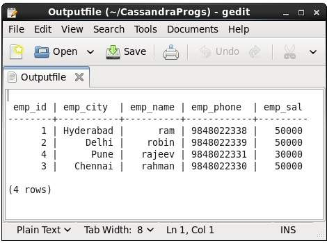 Монгол: Гаралтын файлын хувилбар